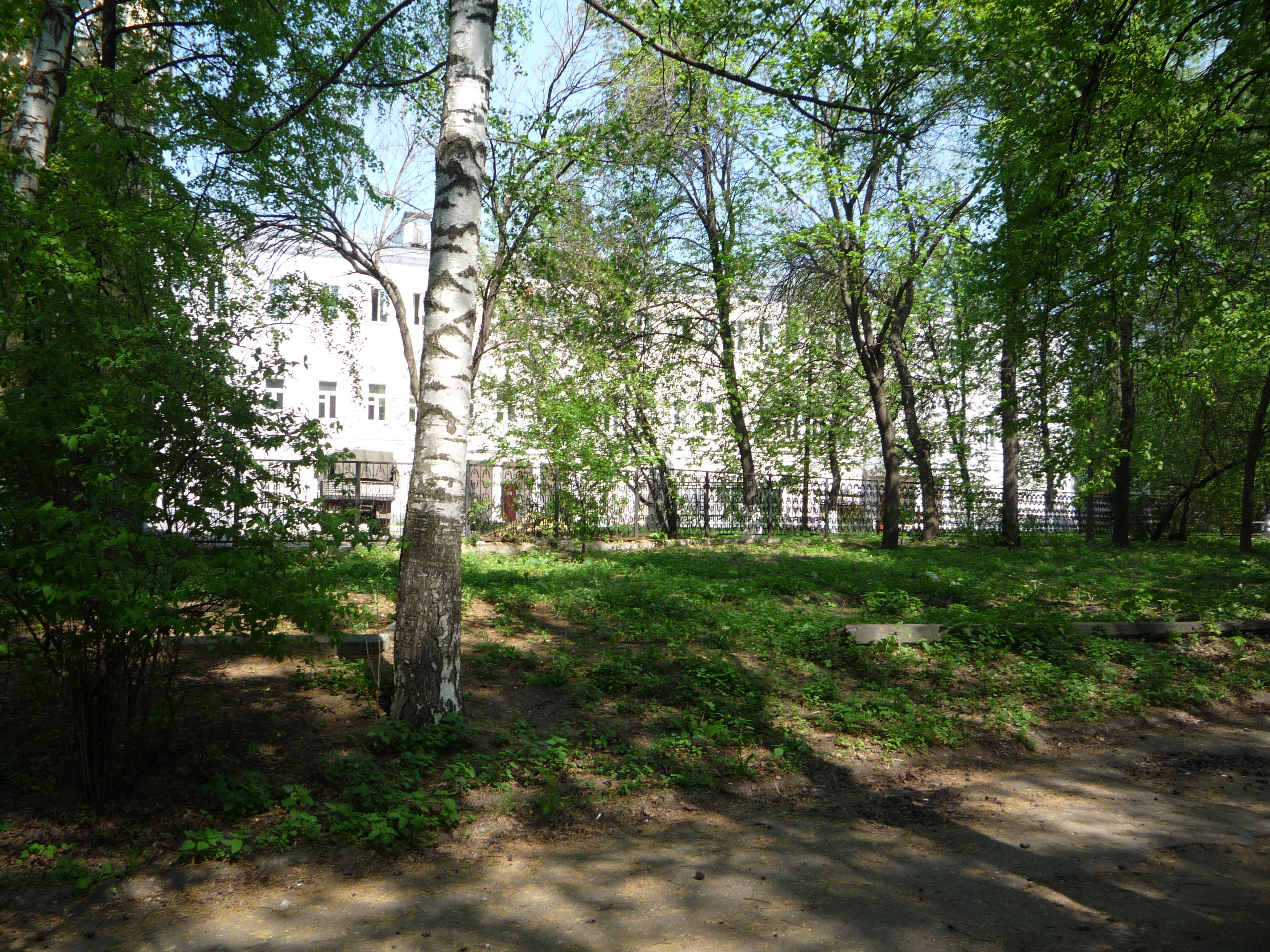 Вид из Детского парка на Нижегородскую государственную консерваторию имени М. И. Глинки